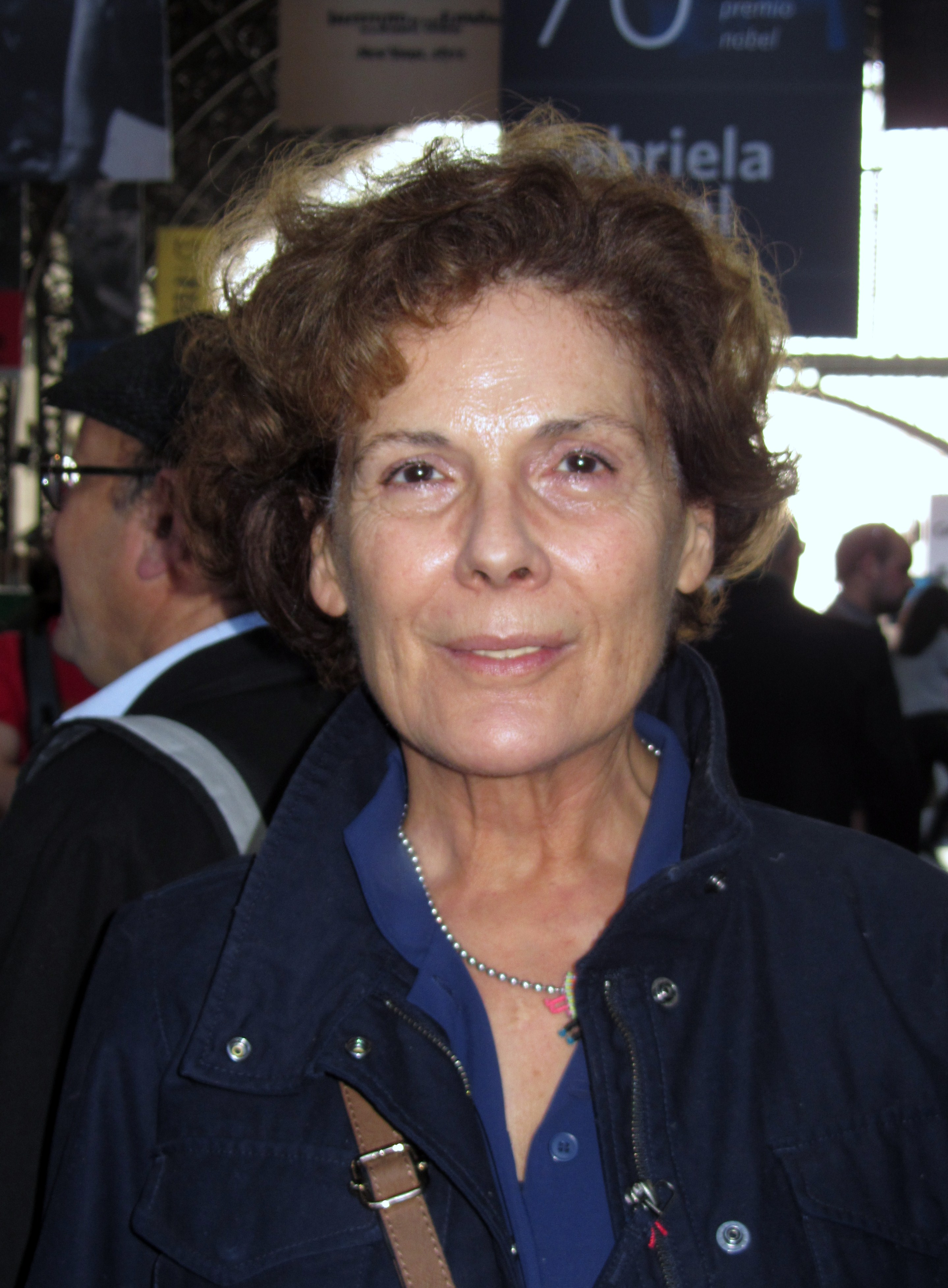 La cineasta Carmen Castillo en la Feria Internacional del Libro de Santiago 2015